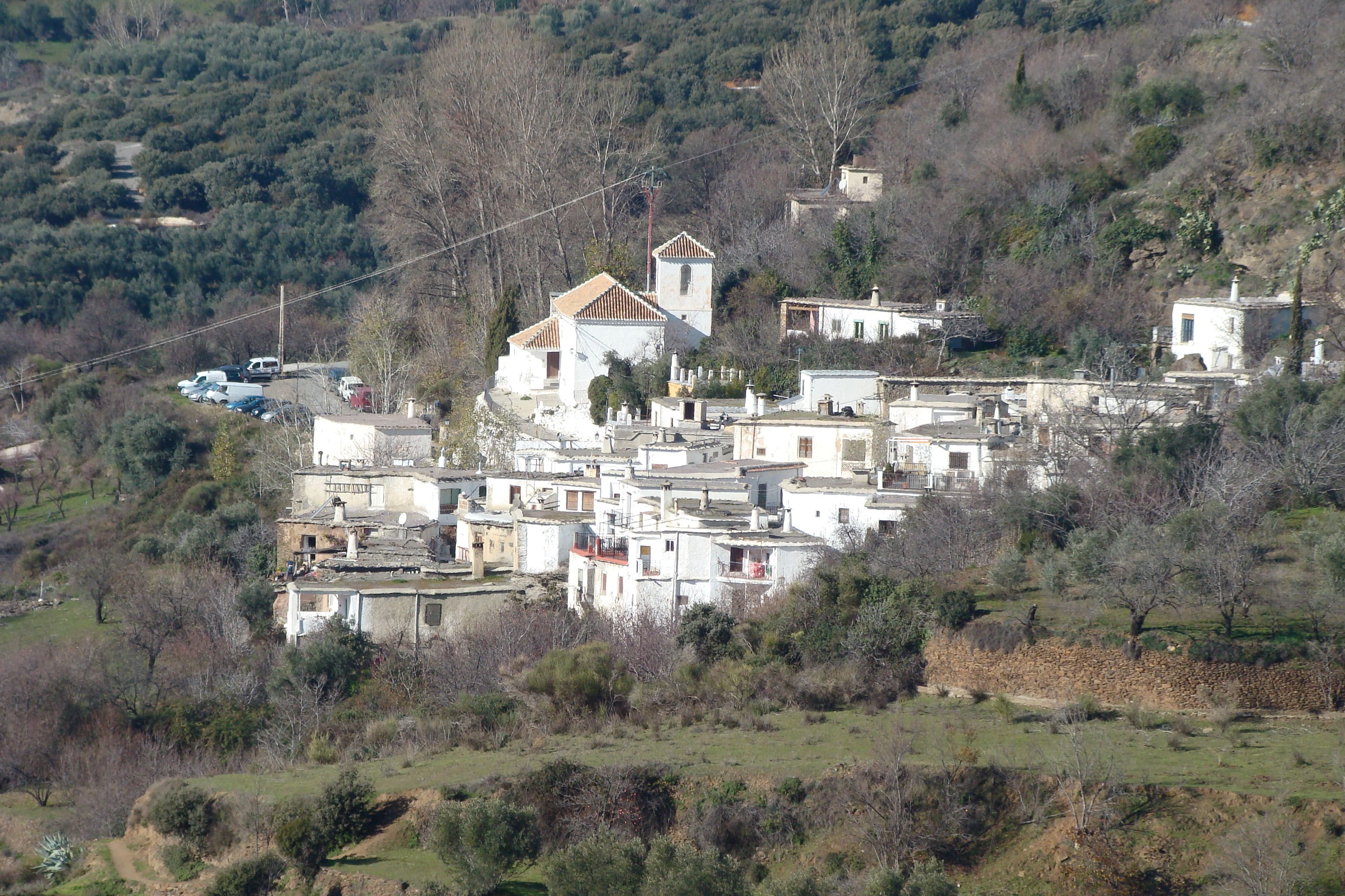 Vista de Atalbéitar, en el municipio de La Taha (Granada, España) desde la Mezquita de Busquístar